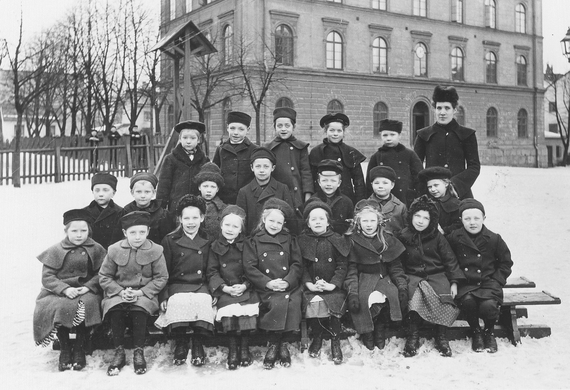 Maria Gamla Skola, 1:a byggnaden från 1864 med elever